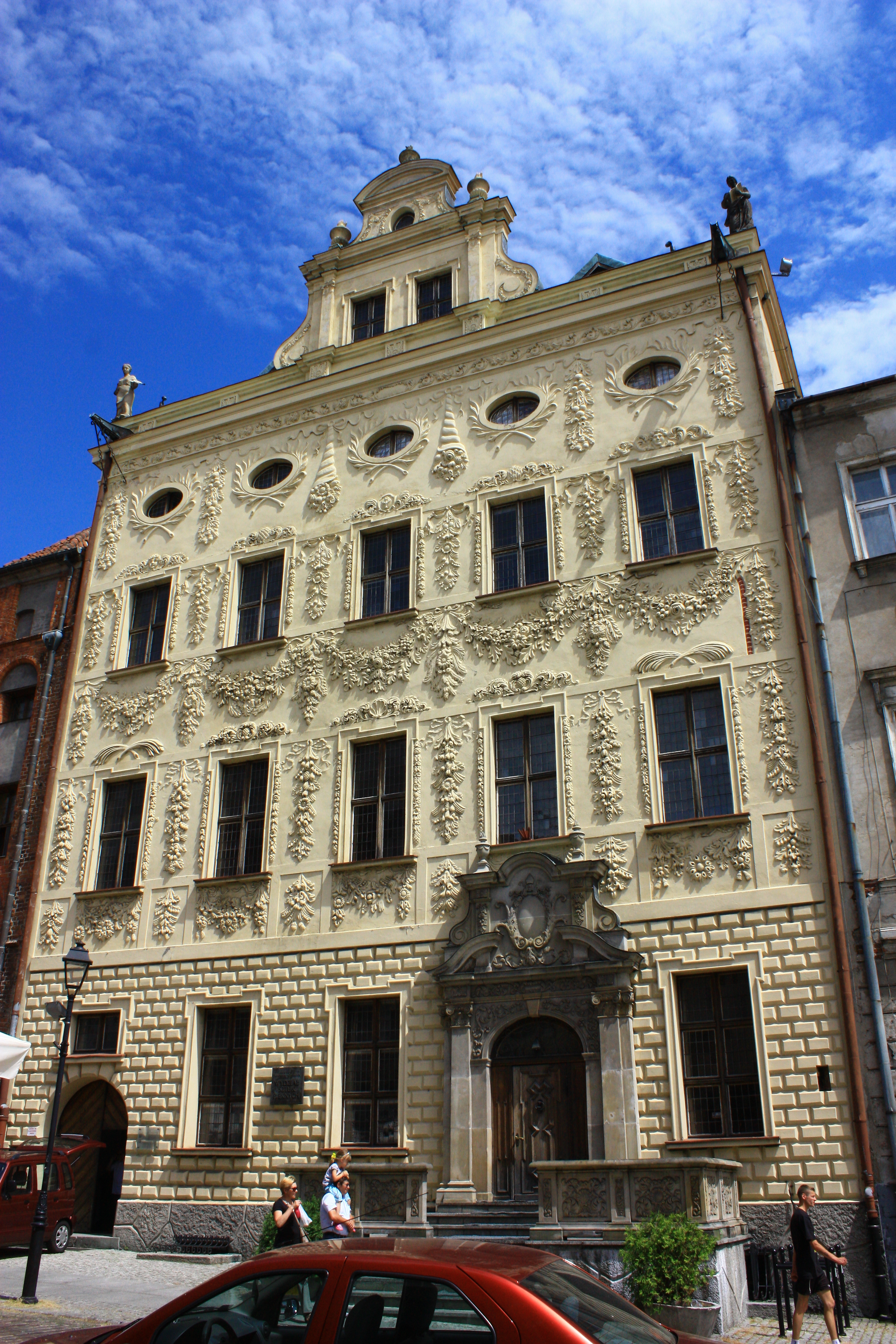 Toruń, pałac biskupa Dąmbskiego, 1693-1699